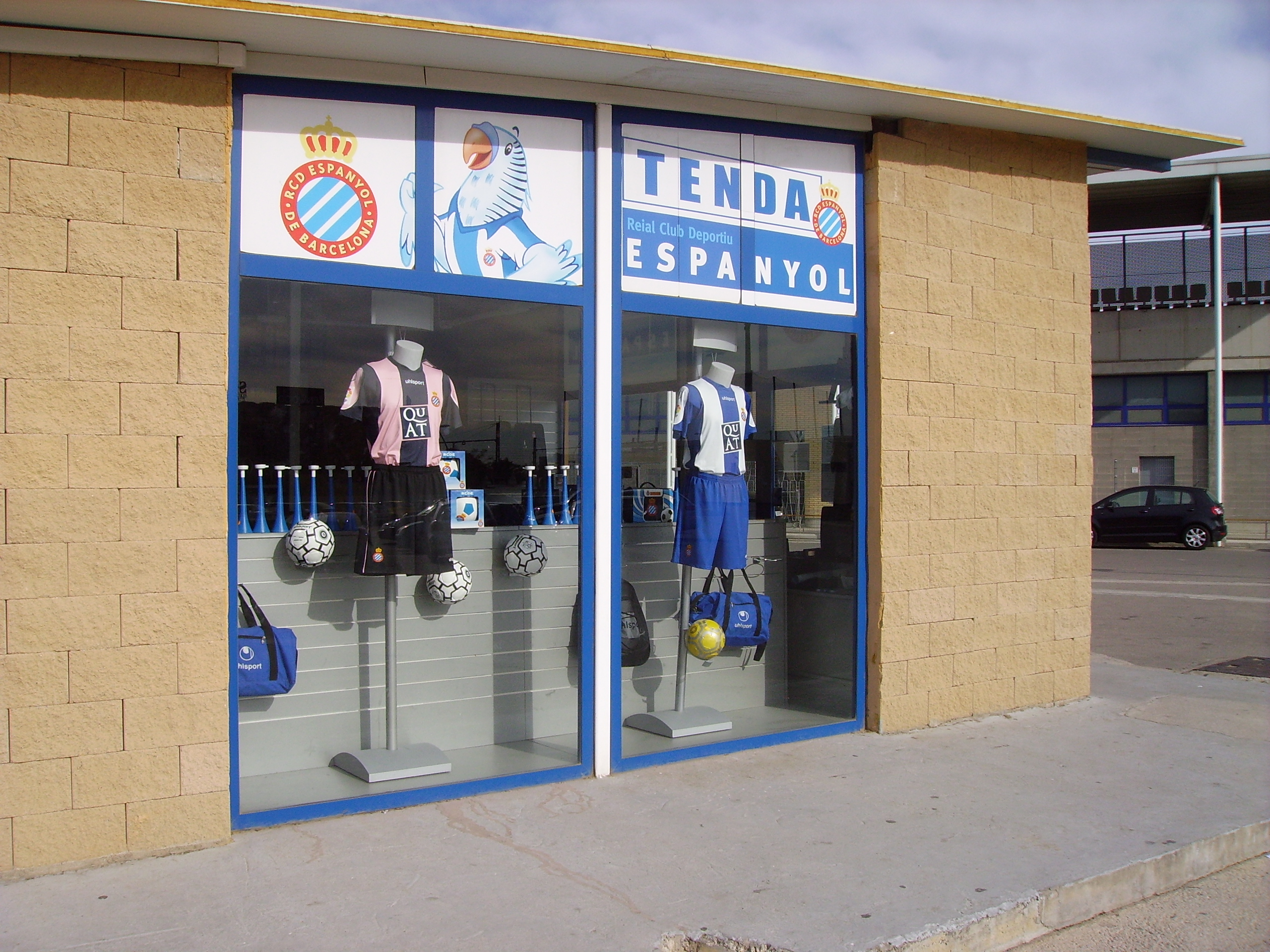 Botiga del RCD Espanyol a la Ciutat Esportiva de Sant Adrià de Besòs (Barcelonès, Catalunya).